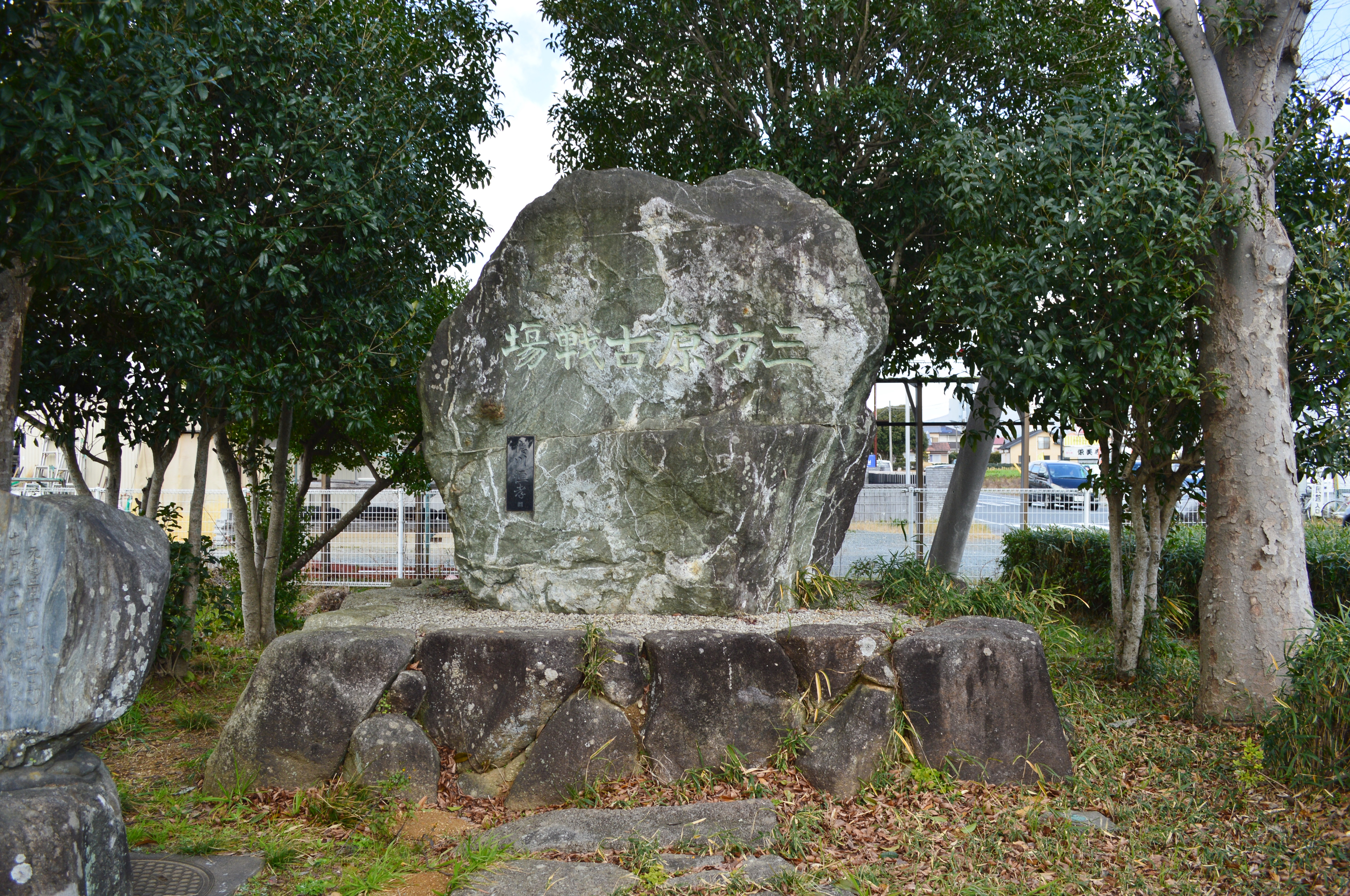 三方原古戦場碑